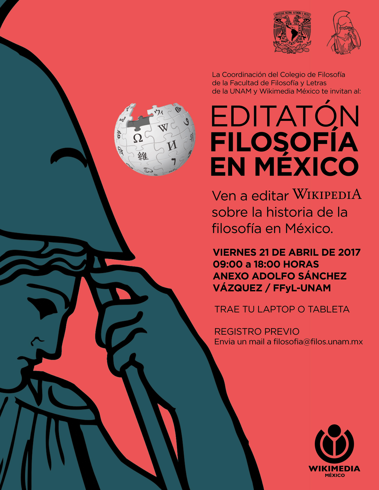 Cartel para el Editatón Filosofia en México.